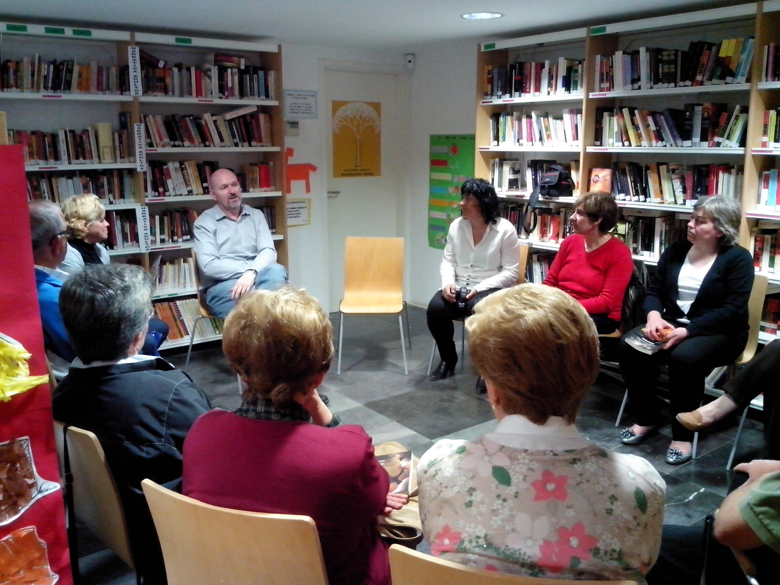 Esteban Navarro charlando con los miembros del club de lectura de Estadilla